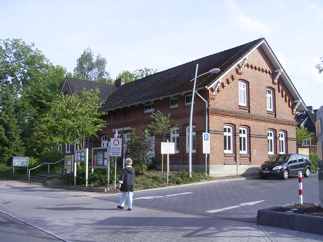 Alte Volksschule des damals stormarnischen Dorfes Wellingsbüttel von 1888. Von 1946 bis 1974 wurde das Gebäude von der Peter-Petersen-Schule genutzt. Jetzt sind eine Sozialstation, ein Kindergarten und eine Zweigstelle der Hamburger Öffentlichen Bücherhallen in dem Gebäude untergebracht. This is the photograph of an architectural monument. It is part of the list of cultural monuments of Hamburg, no. 1260